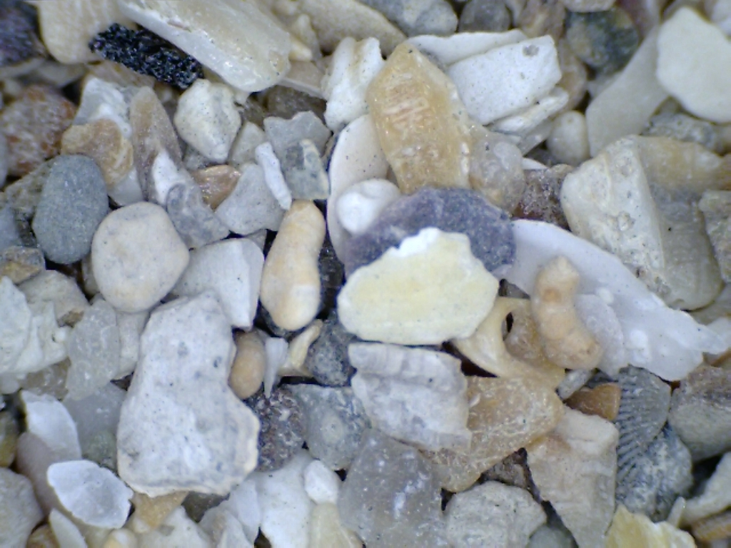 Vogelgritt Mischung aus Steinen und Muscheln